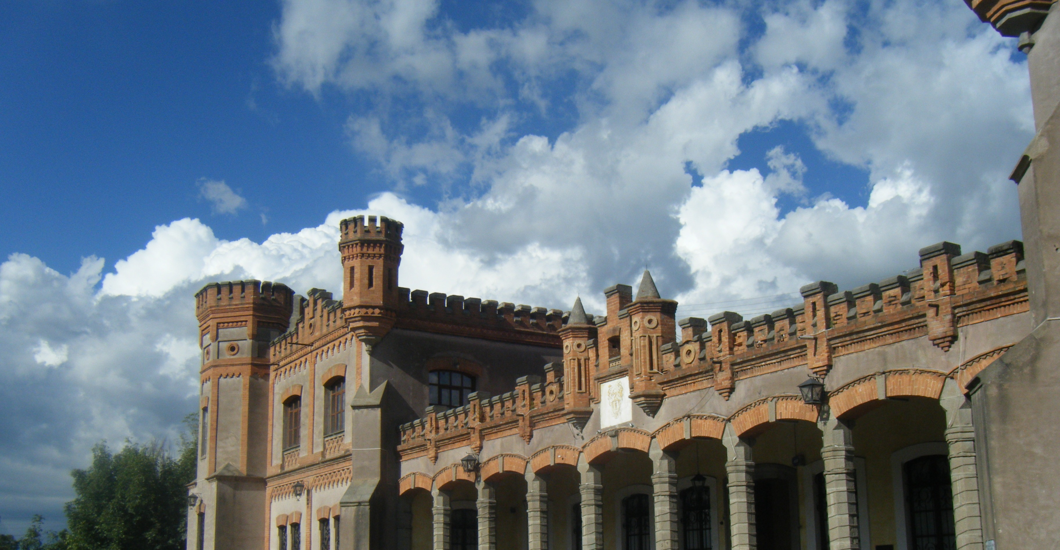 Hacienda Soltepec, Tlaxcala, México